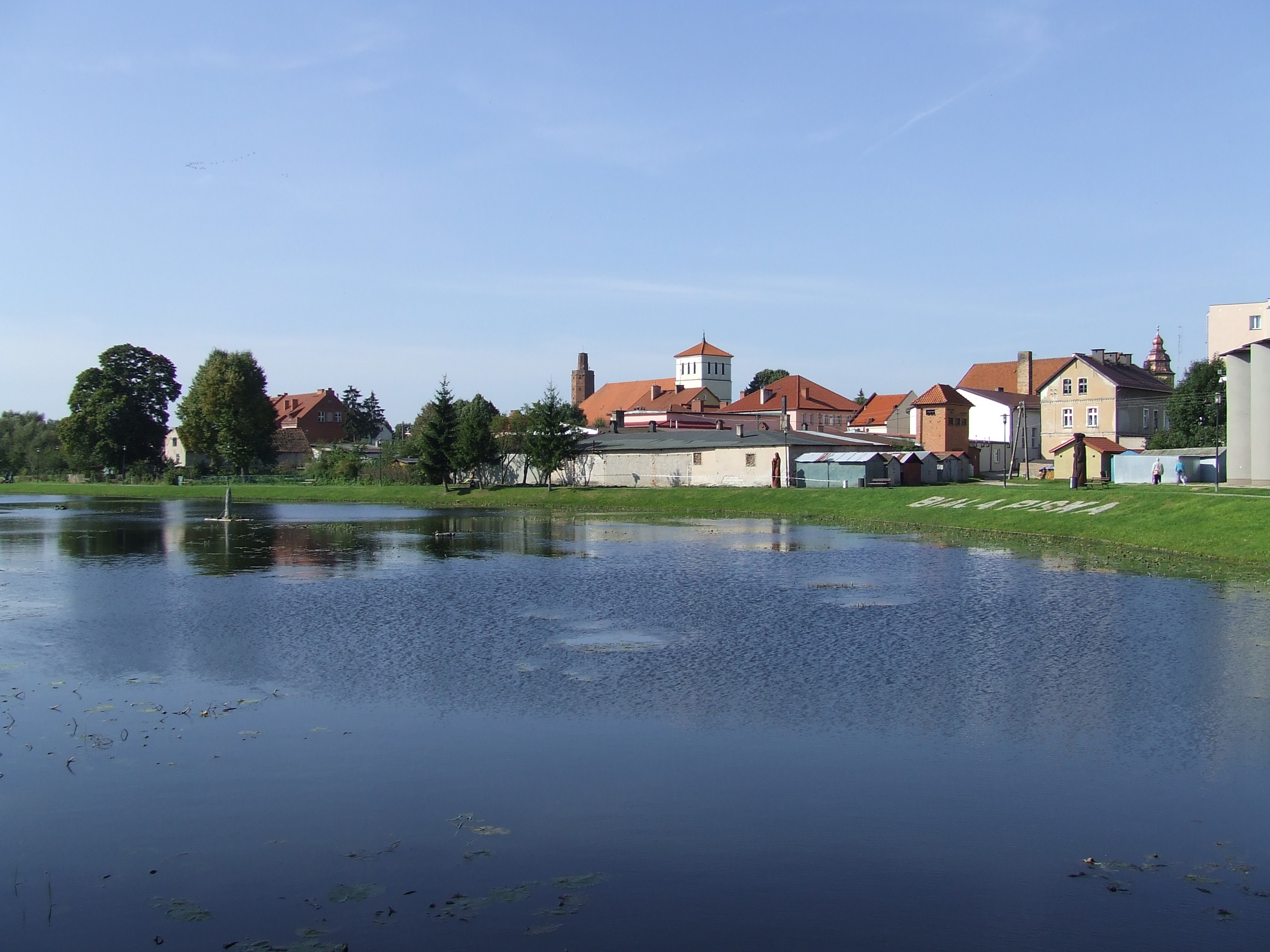 Zalew na rzece Białka - Biała Piska